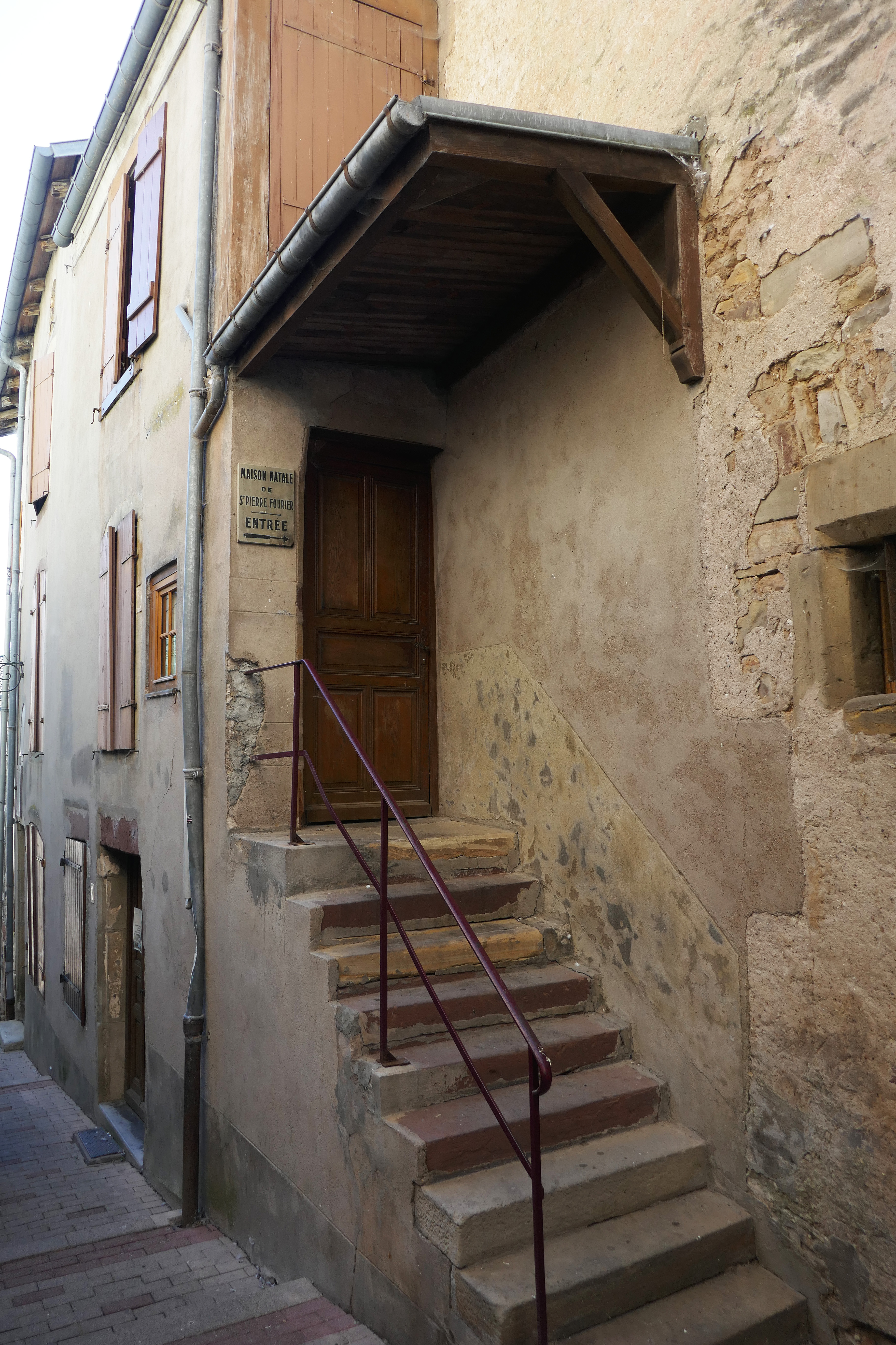 Maison natale de Saint Pierre Fourier à Mirecourt (Vosges).